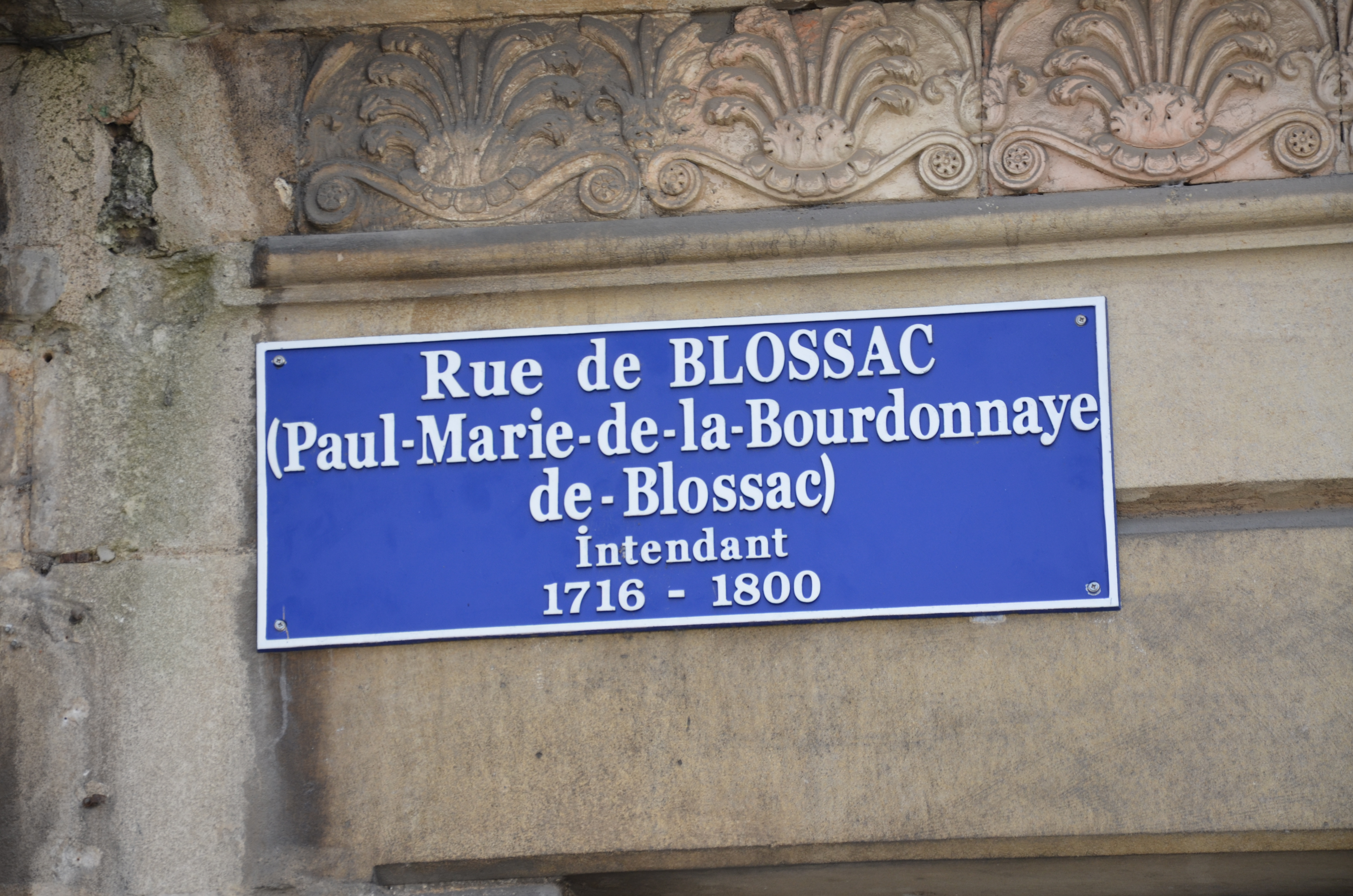 Plaque de rue à Poitiers : rue de Blossac (Paul Marie de la Bourdonnaye de Blossac).